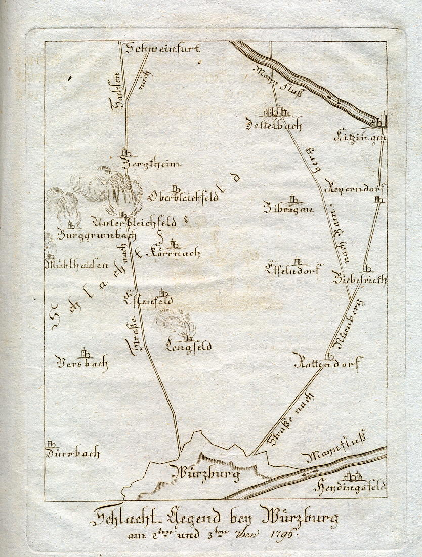 Schlacht-Gegend bey Würzburg am 2ten und 3ten 7ber 1796.